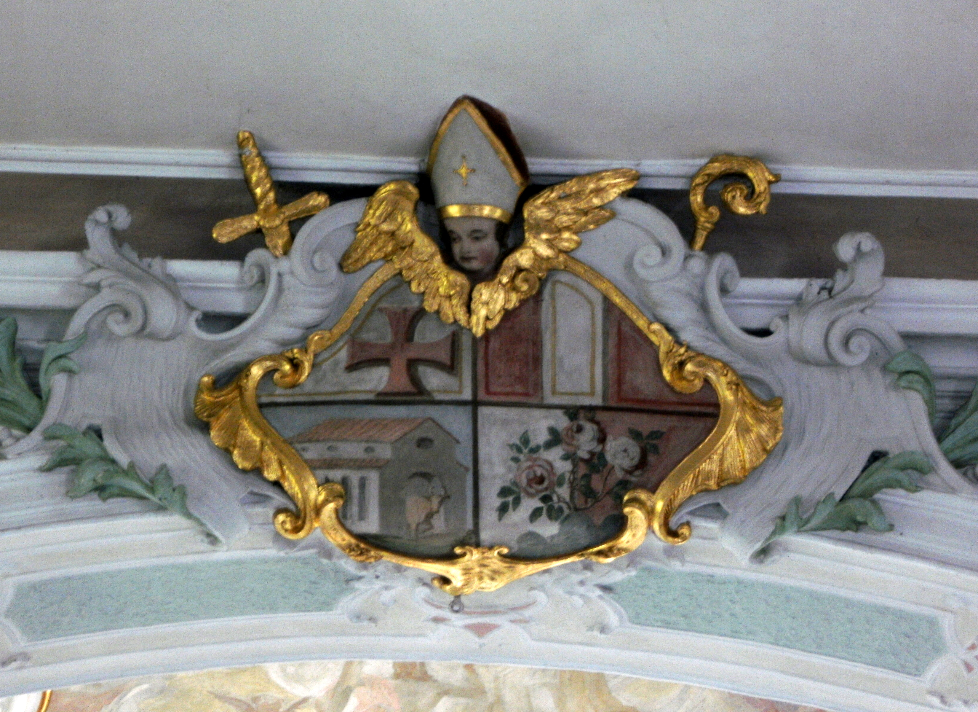 Untersulmetingen, Pfarrkirche St. Georg und Sebastian („Niederkirch“); Chorbogen; Wappen von Benedikt Denzel, 25. Reichsabt von Ochsenhausen